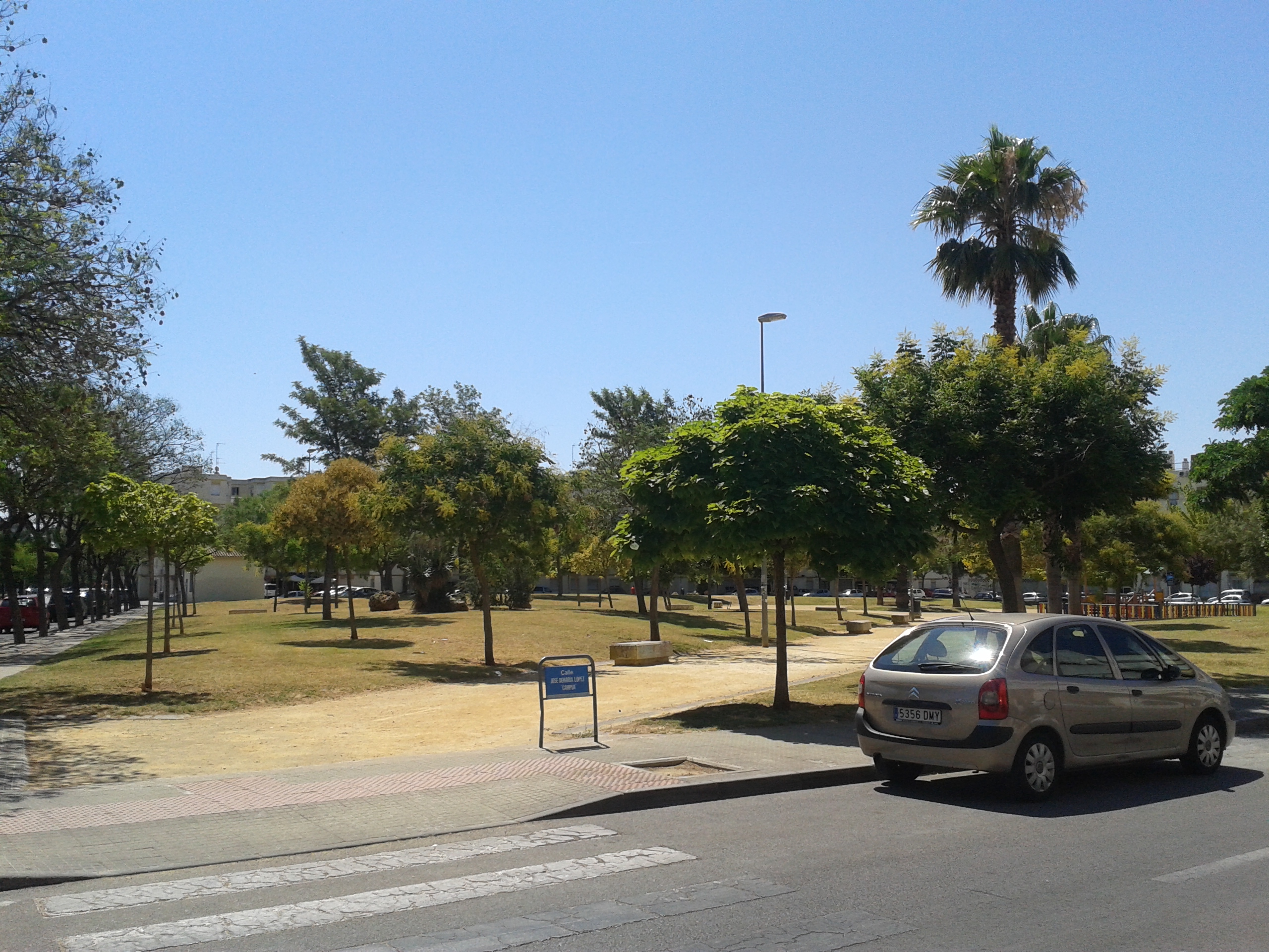 Parque José L. Demaría López «Campúa» en Jerez